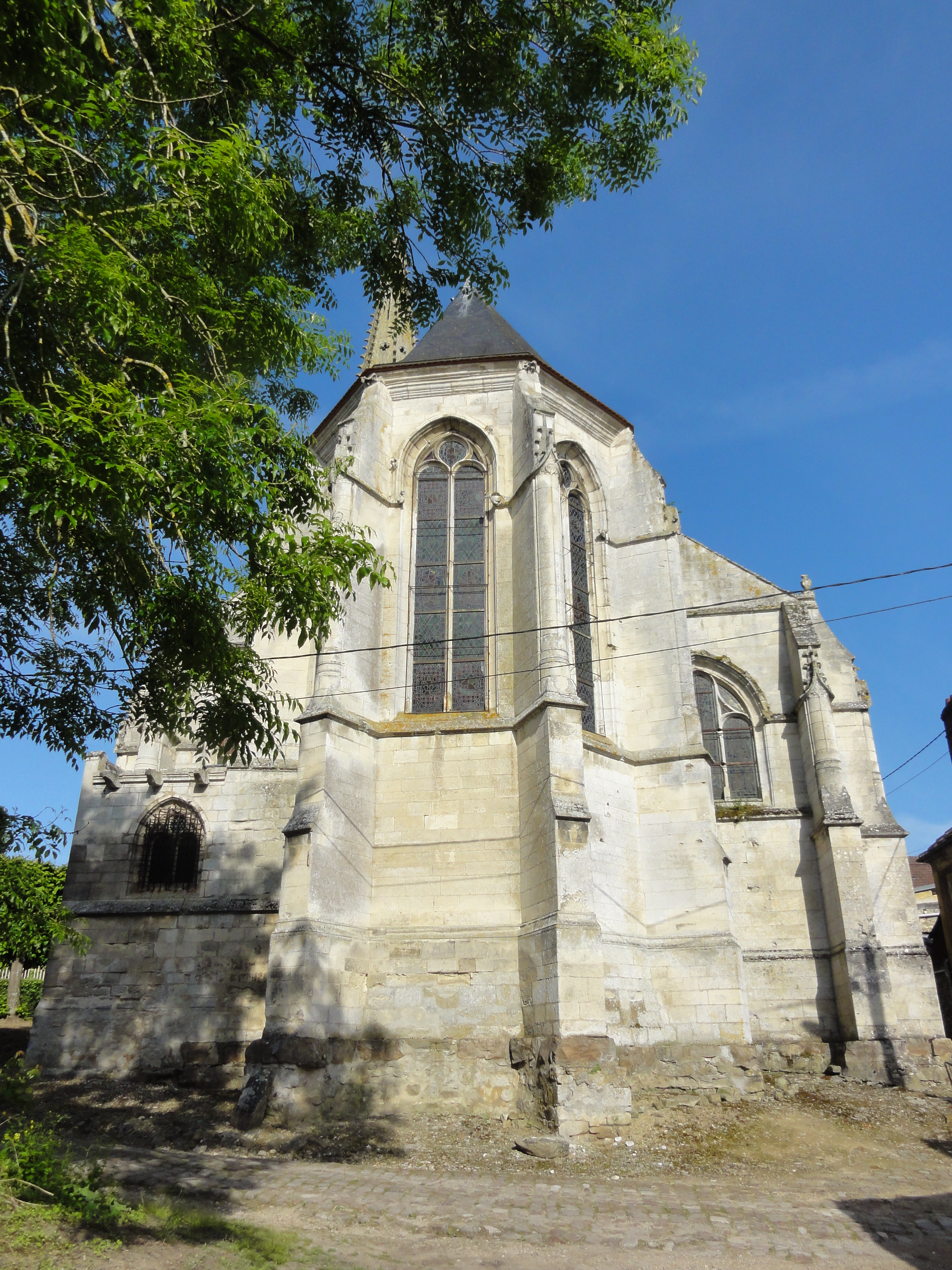 Église Saint-Martin de Versigny (voir titre).